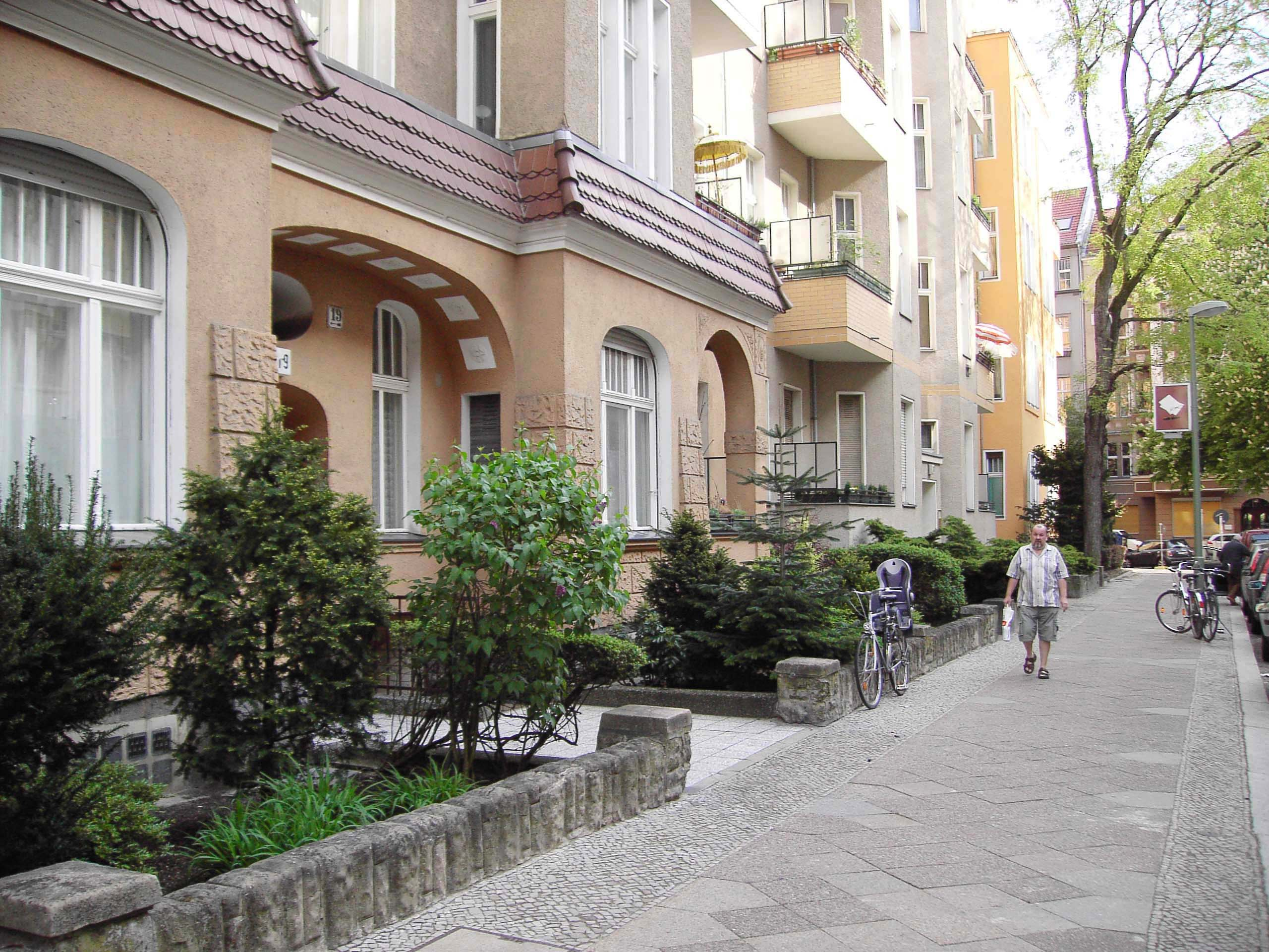 Bayerisches Viertel, Bozener Straße, Häuserzeile mit Vorgärten, Berlin-Schöneberg